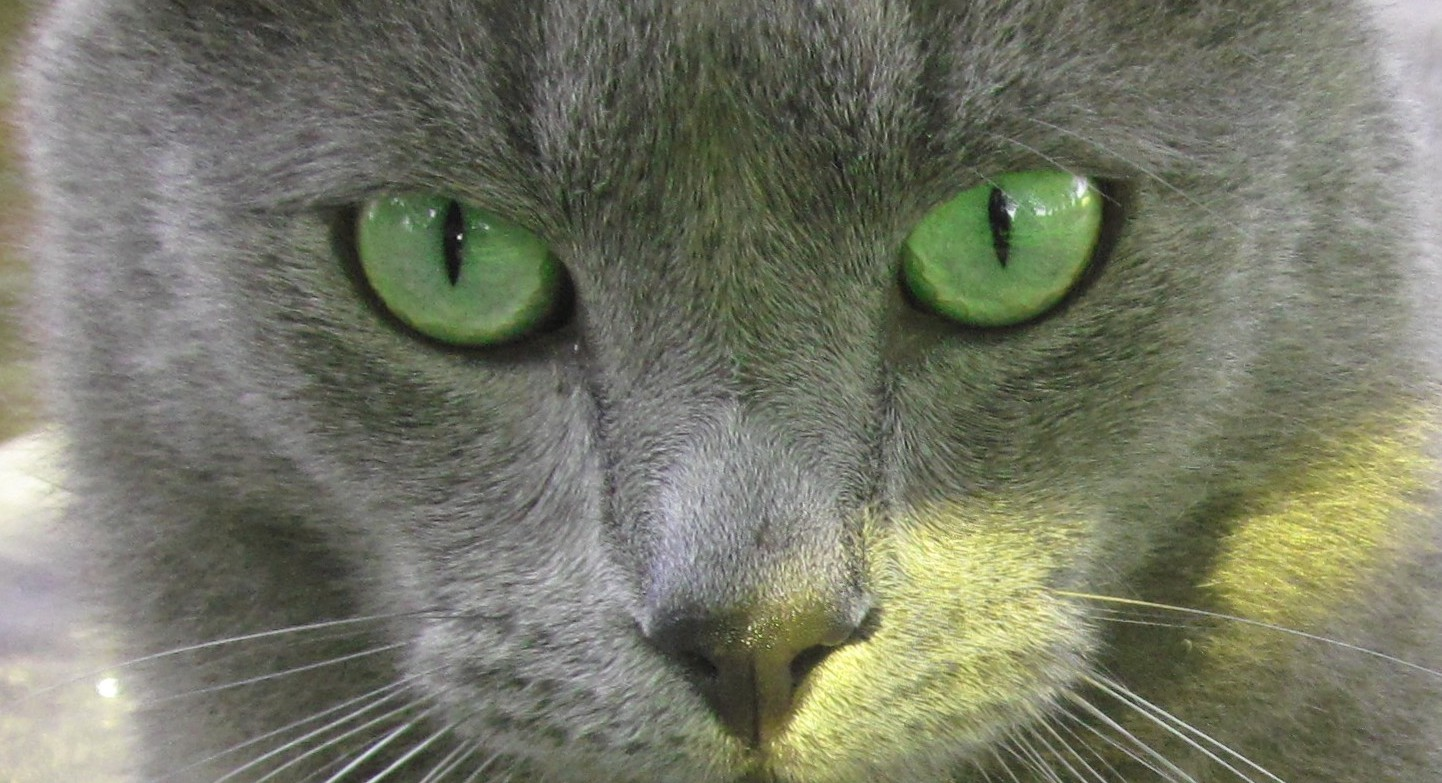 Bleu russe